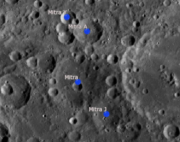 Cráter lunar Mitra. Cráteres satélite. (Imagen LRO)